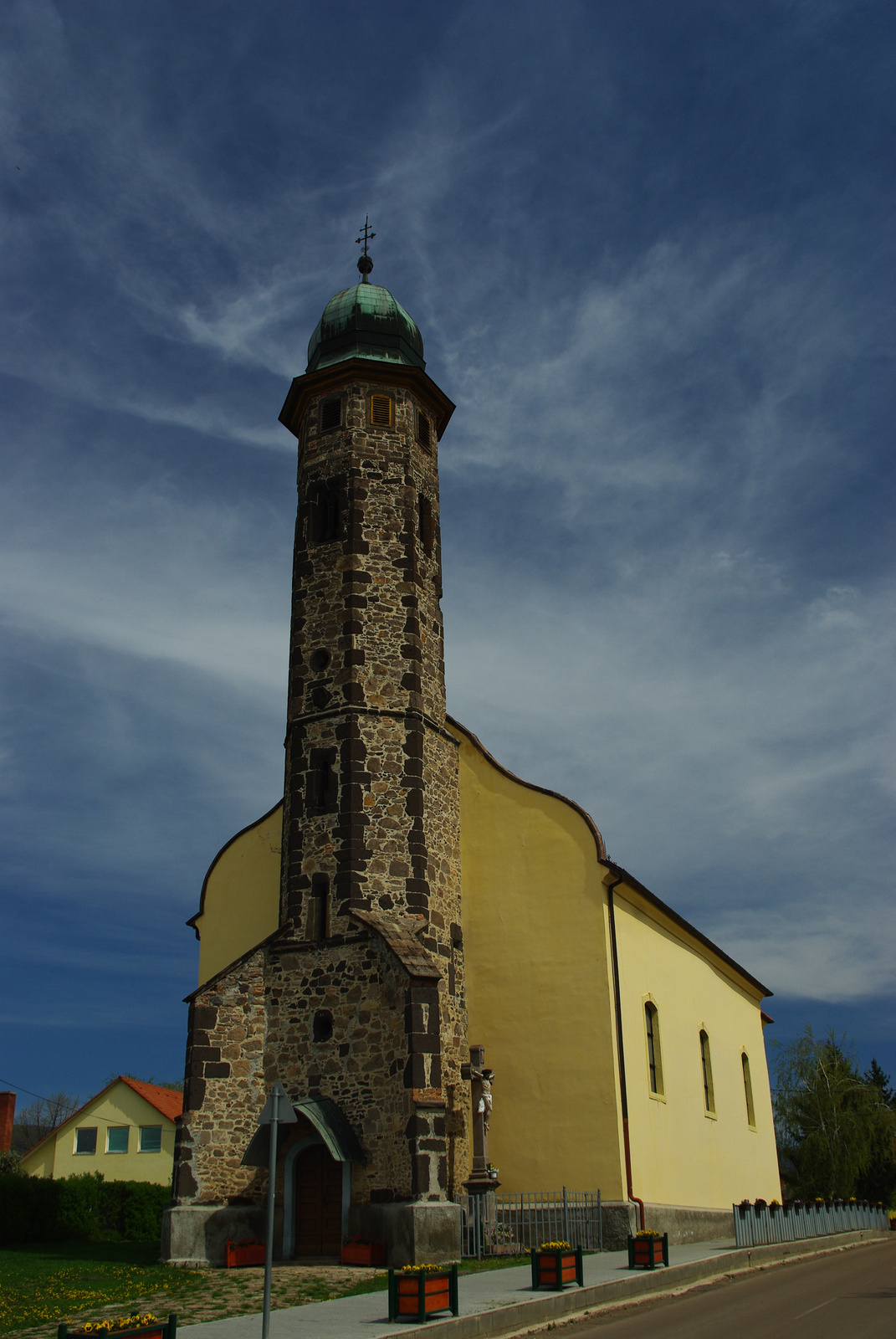 R. k. templom (Szent Miklós püspök) (Gyöngyössolymos, Szabadság út 164.) This is a photo of a monument in Hungary. Identifier: 5728